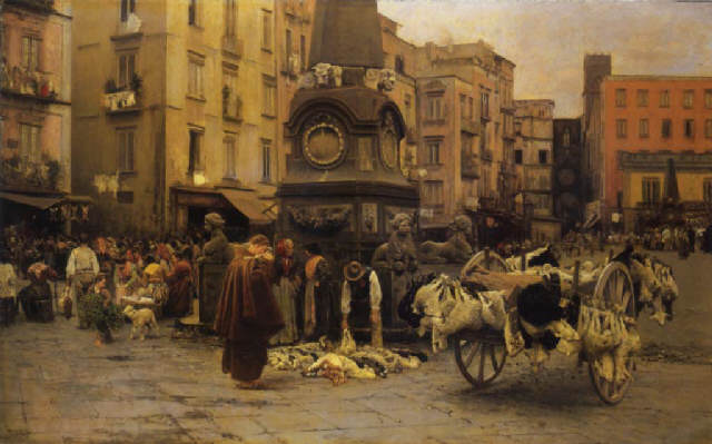 a picture from Vincenzo Caprile